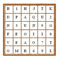 Una griglia ricavata riempiendo casualmente gli spazi vuoti dopo aver inserito mediante una griglia cardanica una parola chiave.